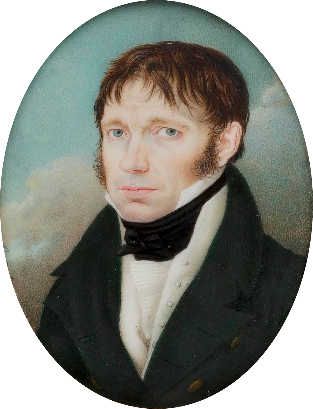 Miniatura przedstawiająca Samuela Bogumiła Lindego. Identyfikator: Min.673 MNW.